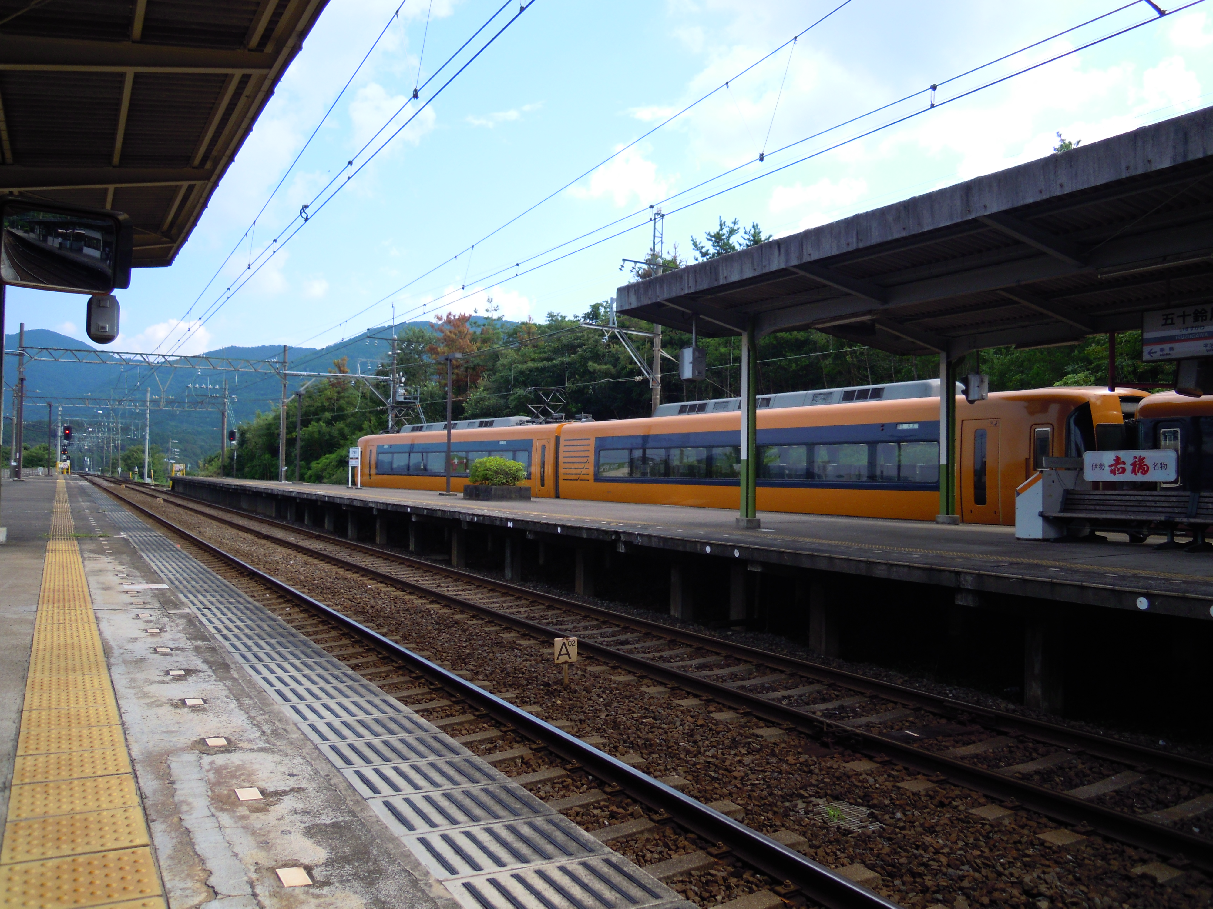 五十鈴川駅ホーム